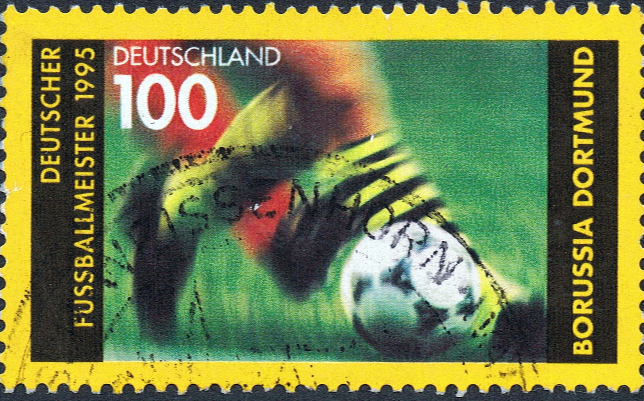 Deutscher Fußballmeister 2009-Borussia Dortmund Mi-Nr 1833